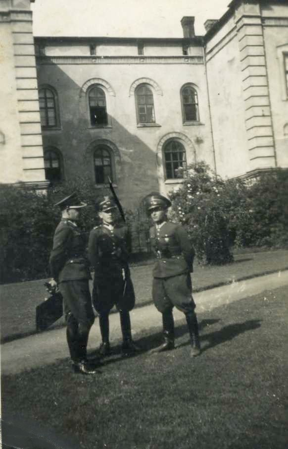 Oficerowie 2 Pułku Piechoty KOP przed Pałacem Habsburgów w Żywcu, w którym mieścił się sztab pułku.